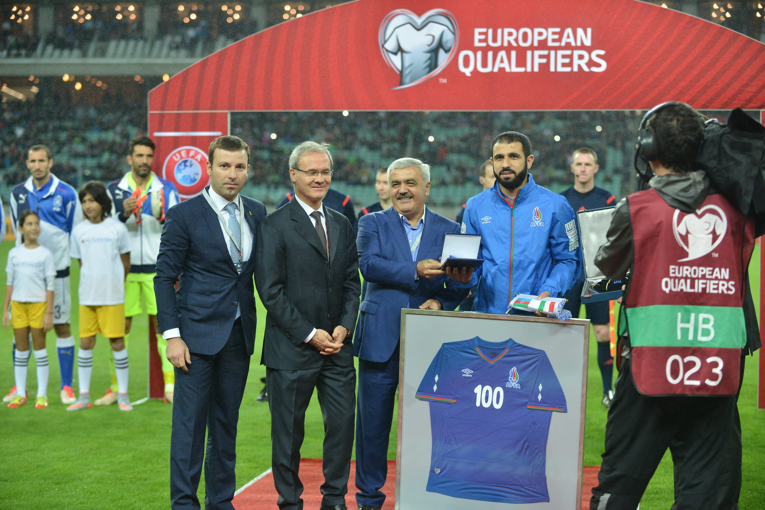 Rəşad Sadıqov